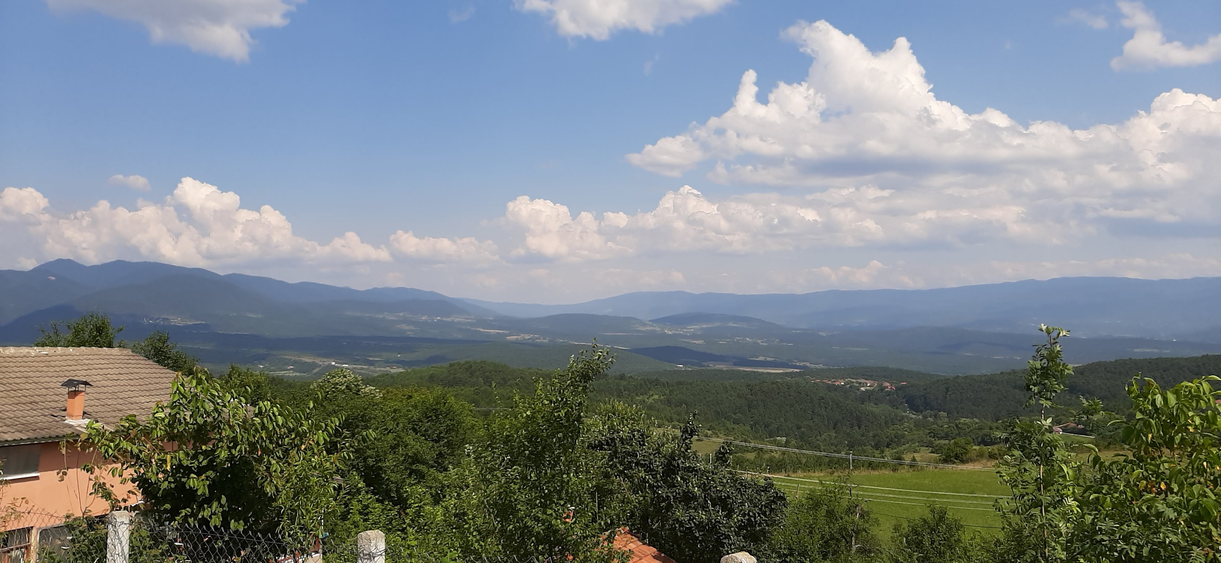 Akören köyünden Mengen ilçe merkezi yönüne bakış